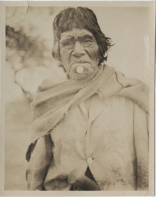 Chiriguano-Indianer mit Lippenpflock Positiv, SW Nils Erland Herbert v. Nordenskiöld (19.7.1877 - 5.7.1932), Fotograf 1908/1909 Bolivien (Land) Chiriguano (Ethnie) Foto Bildformat (Foto): 12,6 x 9,6 cm Ident.Nr. VIII E 3584 Staatliche Museen zu Berlin, Preußischer Kulturbesitz, Ethnologisches Museum Sammlung: Ethnologisches Museum, Amerika